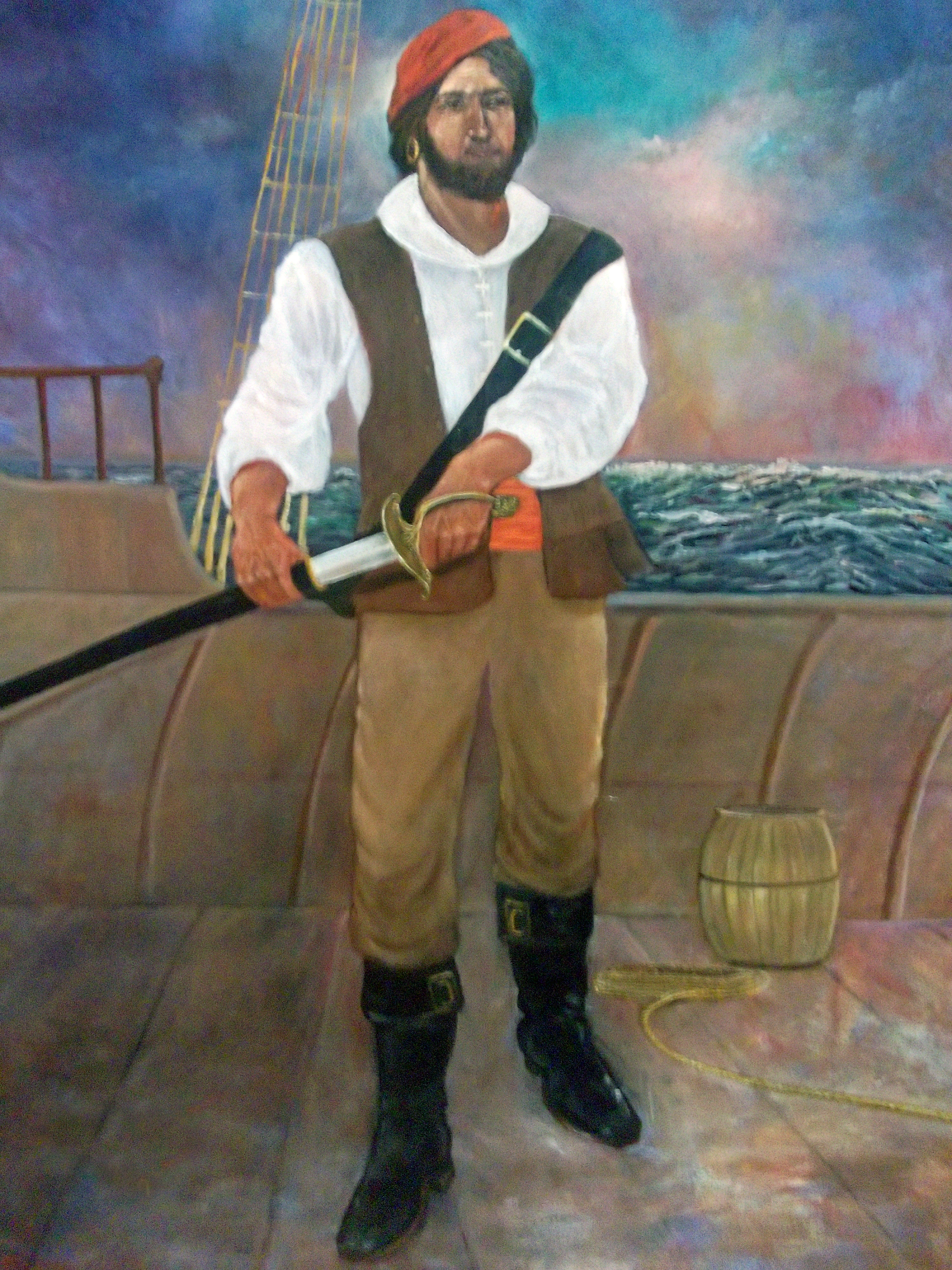 Roberto Cofresí y Ramírez de Arellano